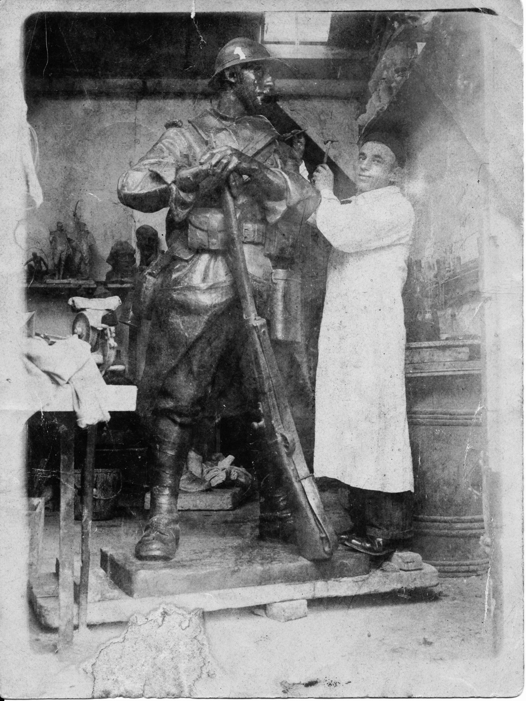 Giuseppe Pannini nel suo studio a PARIS,anno 1930 del XX secolo mentre finisce di eseguire la scultura